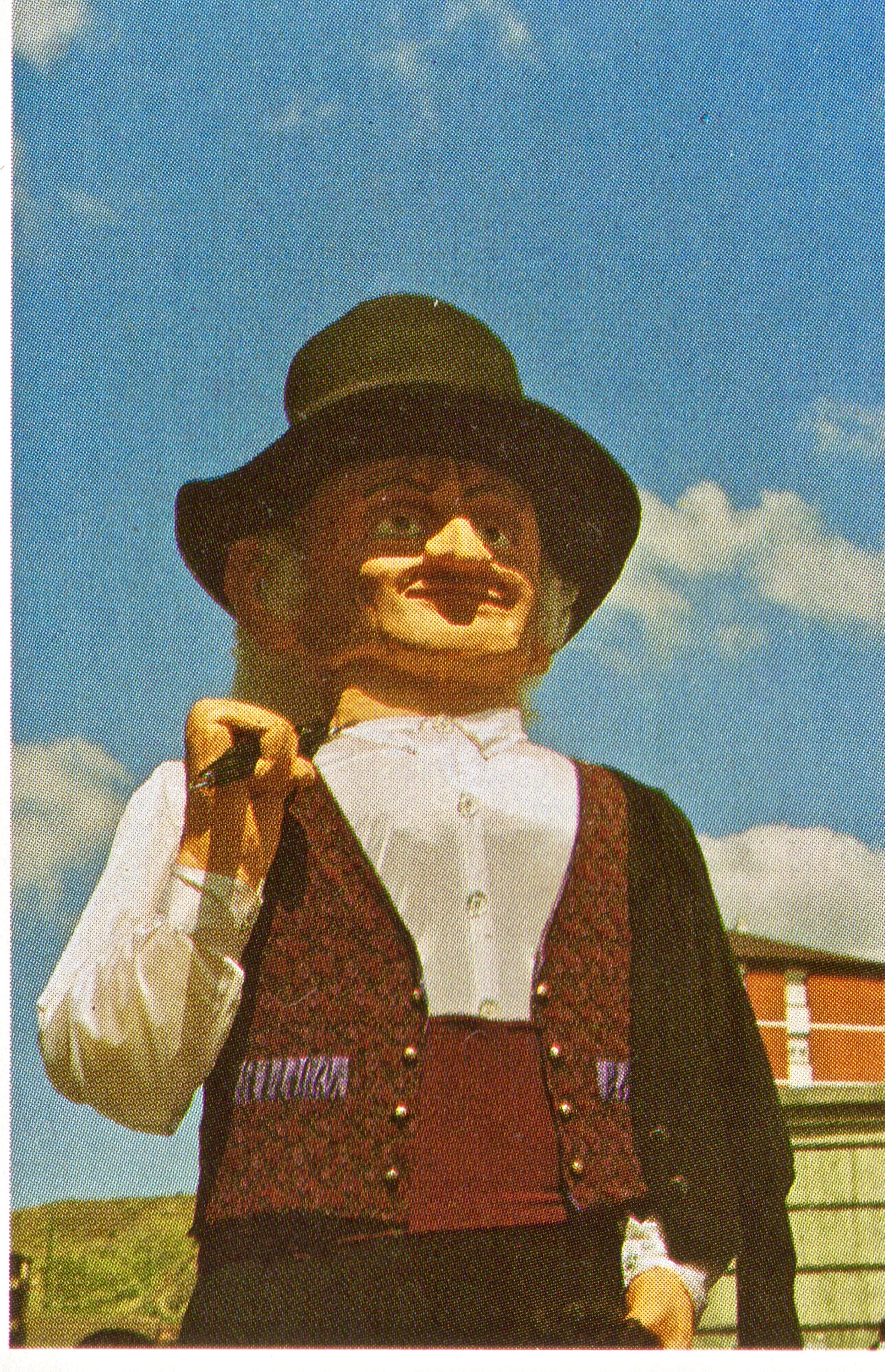 Imagen del gigante